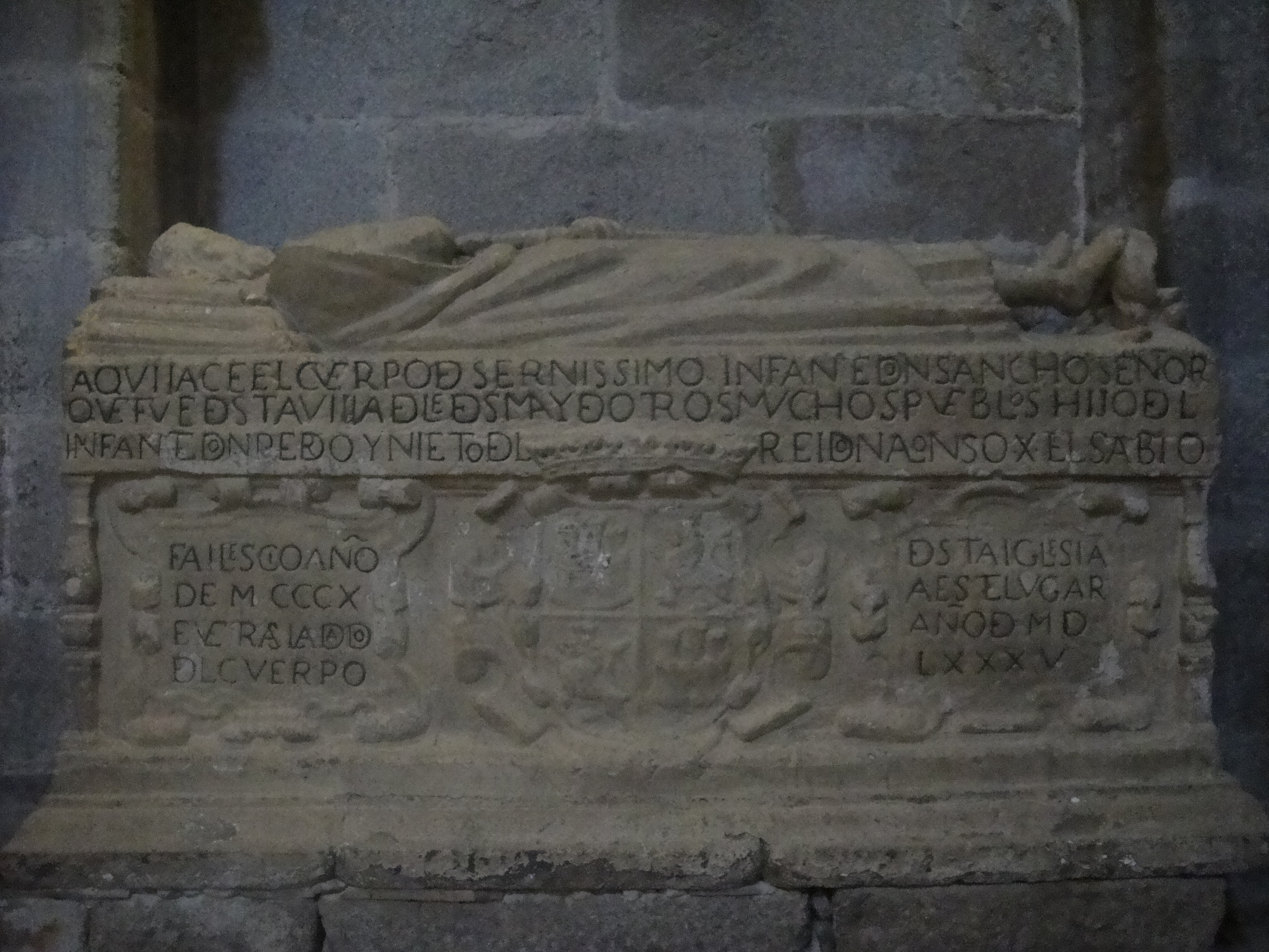 Sepulcro de Sancho de Castilla el de la Paz (m. 1312), que fue hijo del infante Pedro de Castilla y nieto del rey Alfonso X el Sabio, en la iglesia de Santa María la Mayor de Ledesma, provincia de Salamanca, (España).